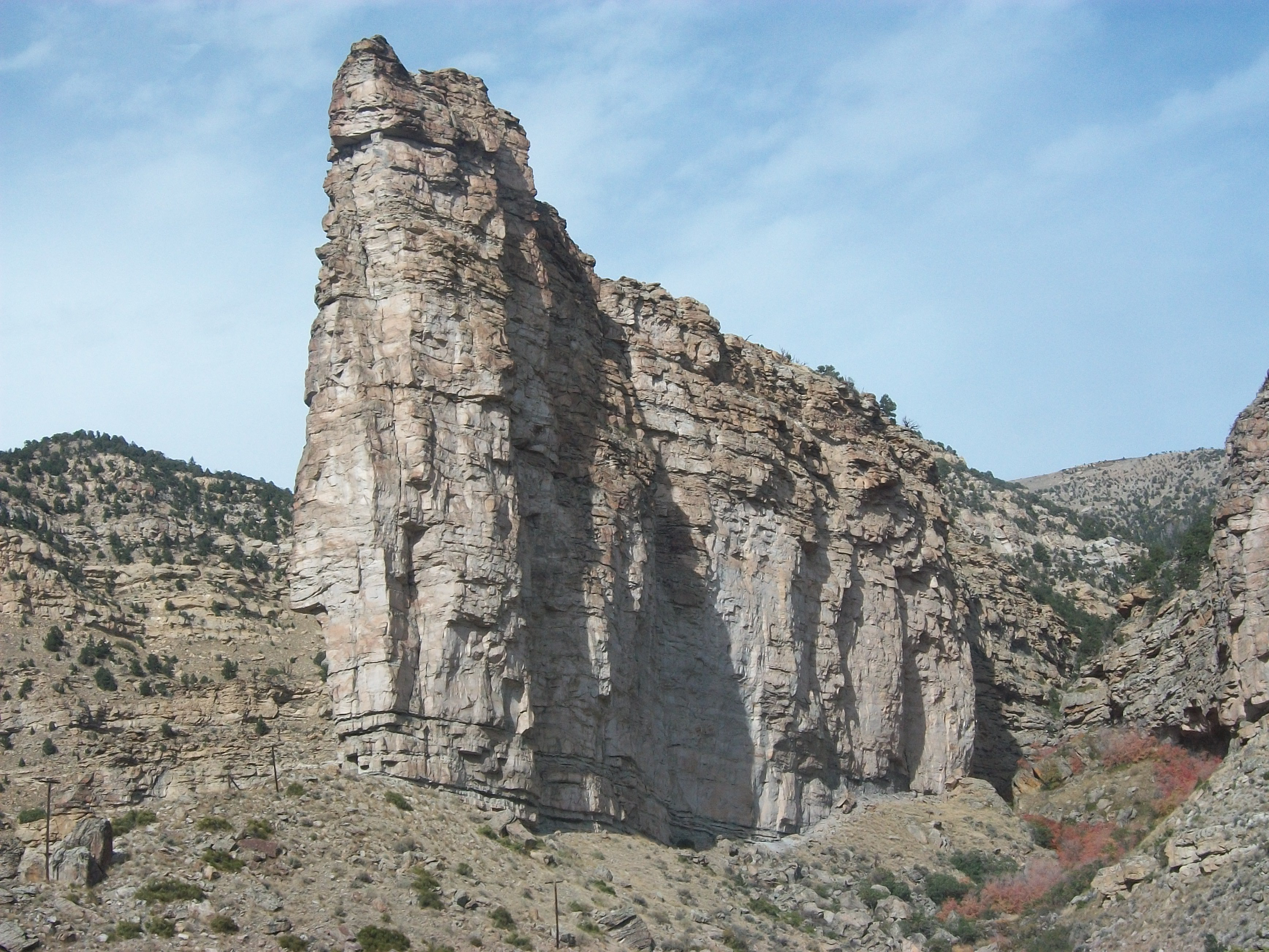 Antelope Island Echo Ghost towns